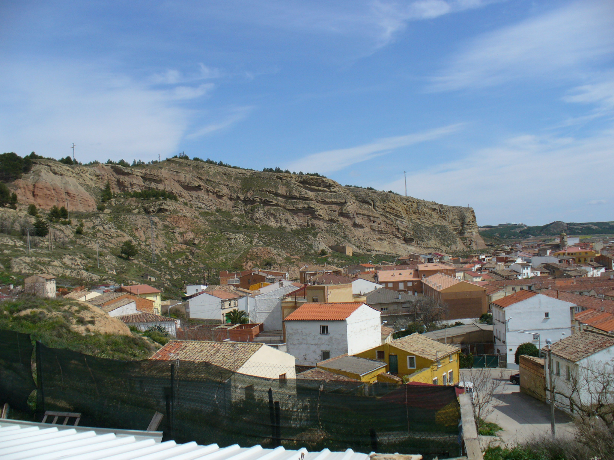 Nafarroako Lodosa.